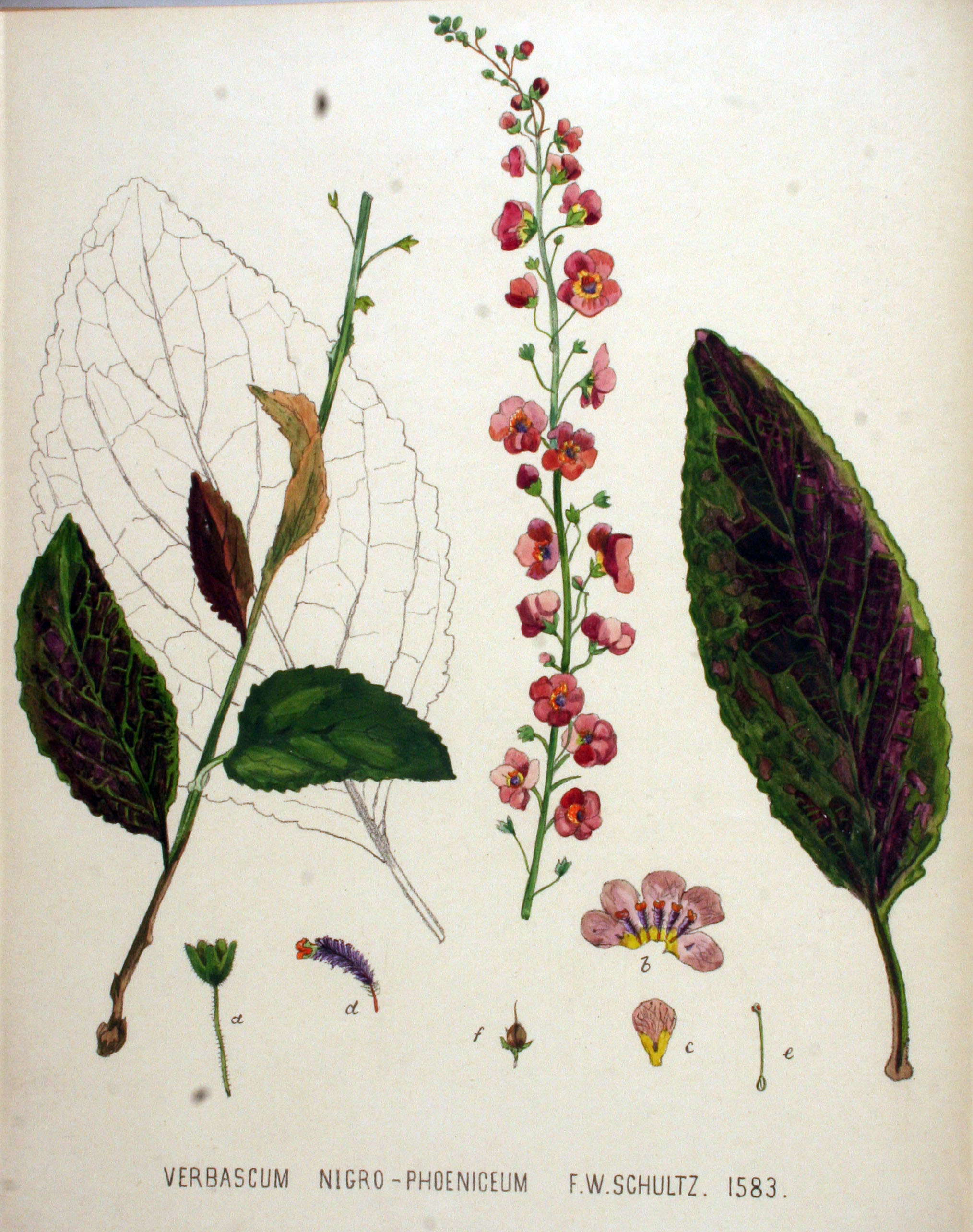 Verbascum nigrum × phoeniceum